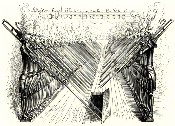 Berlioz Grandville 200 trombones